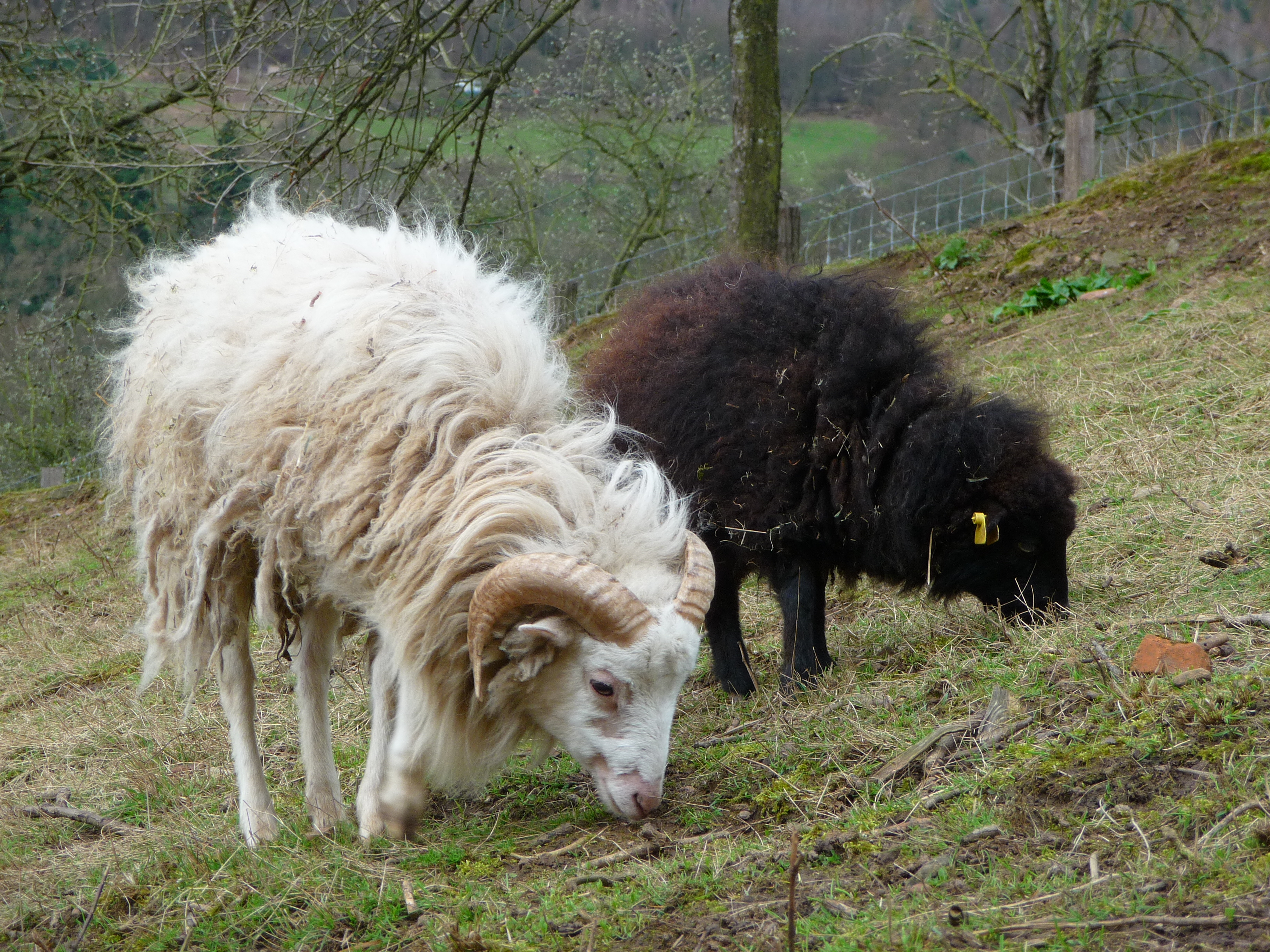 Weidende Ouessant-Schafe (Ushant), fotografiert im Heidelberger Stadtteil Ziegelhausen (Baden-Württemberg, Deutschland)